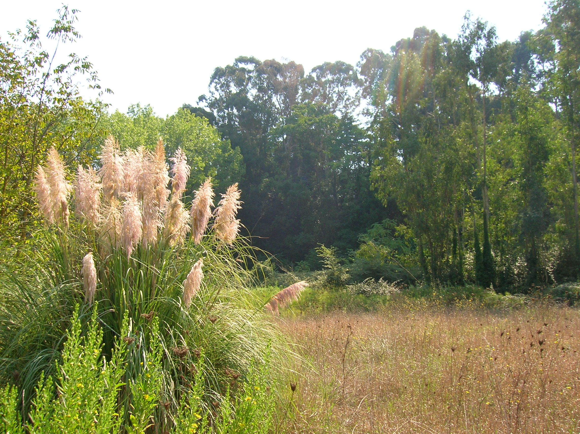 Vegetazione. Parco della Cellulosa, Roma, Lazio, Italia.